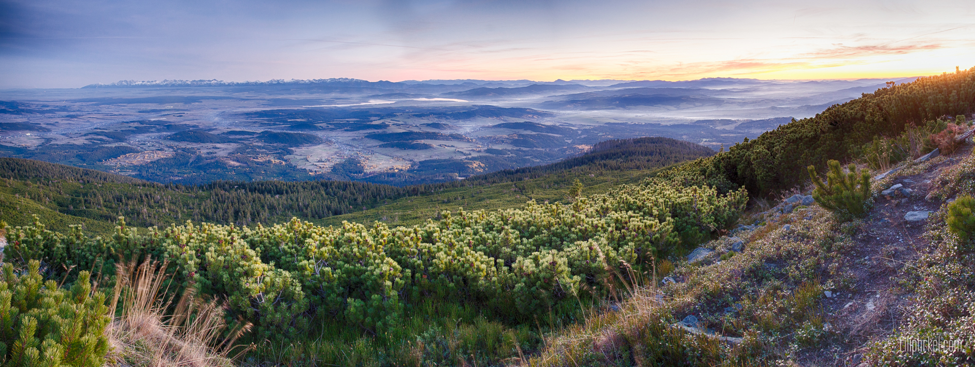 Pred západom slnka